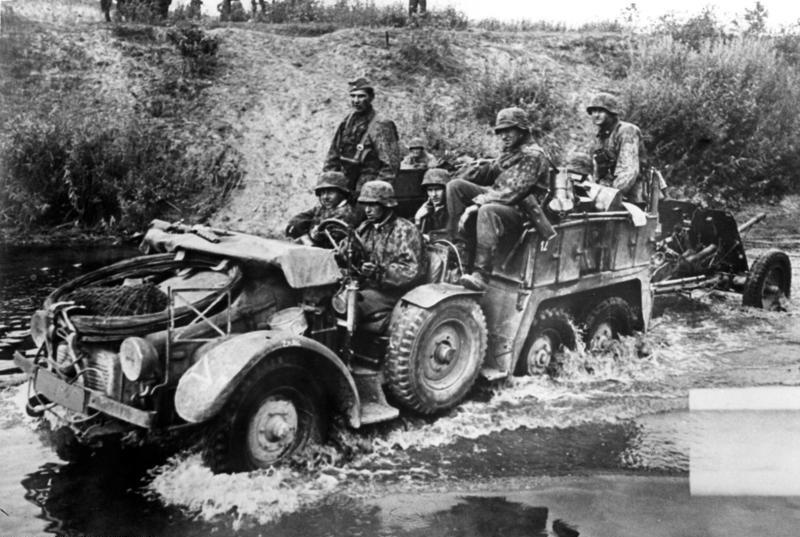 Waffen SS an der Ostfront. Bäche bilden kein Hindernis für die motorisierten Einheiten der Waffen SS. Es geht einfach mitten hindurch. herausg. 19.9.41 SS - PK - Cantzler - Pressebildzentrale